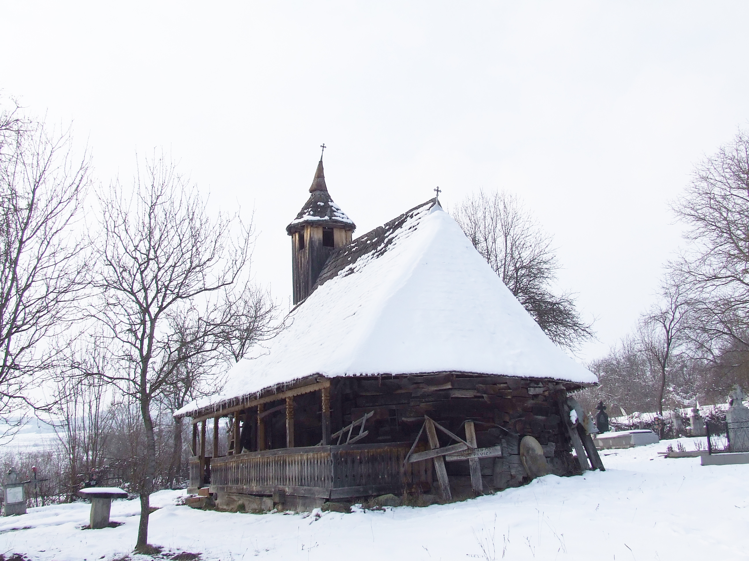 Biserica de lemn din Mura Mică, judeţul Mureş.